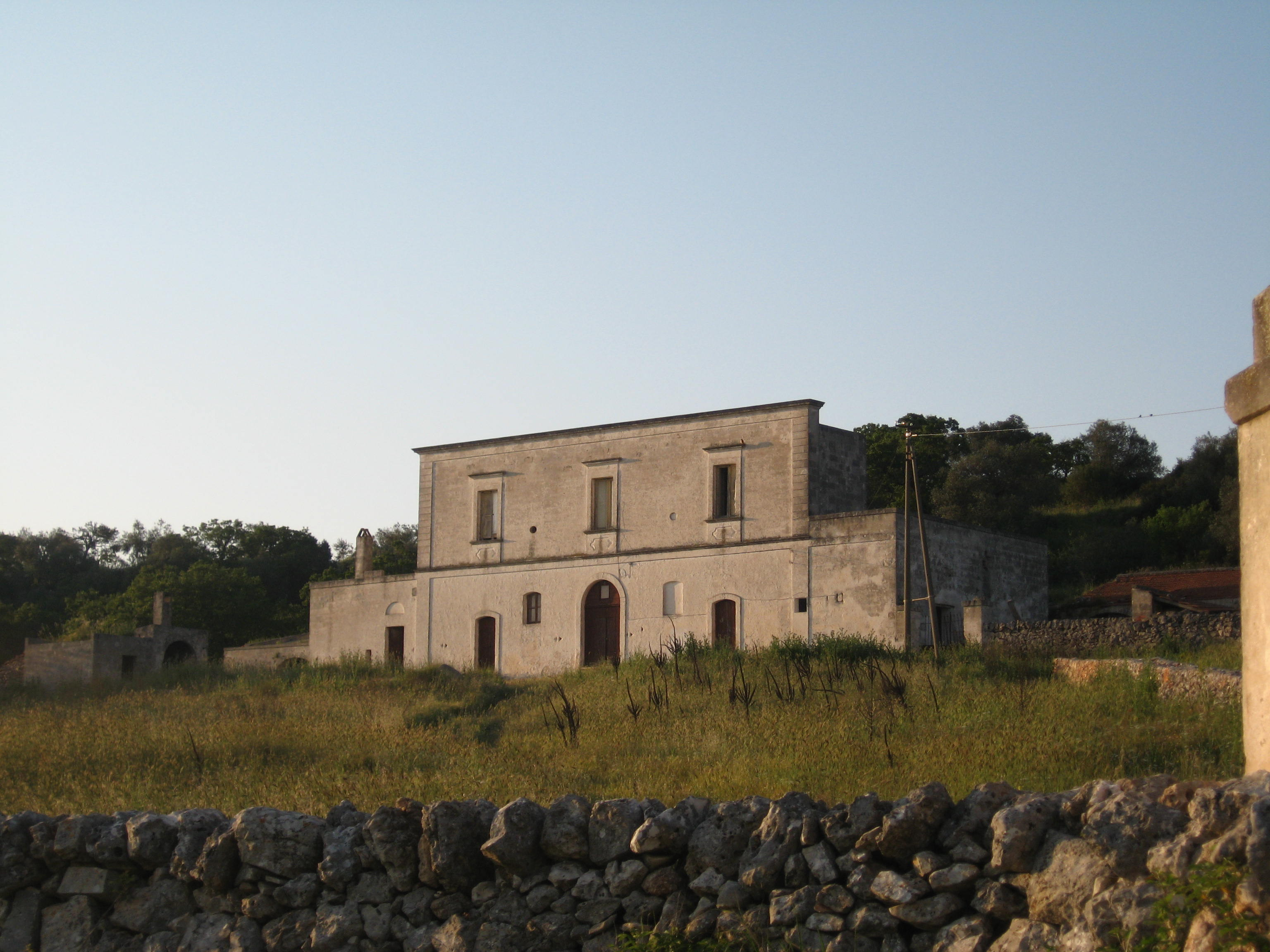 By Stefano Piepoli & Carmine Lentini